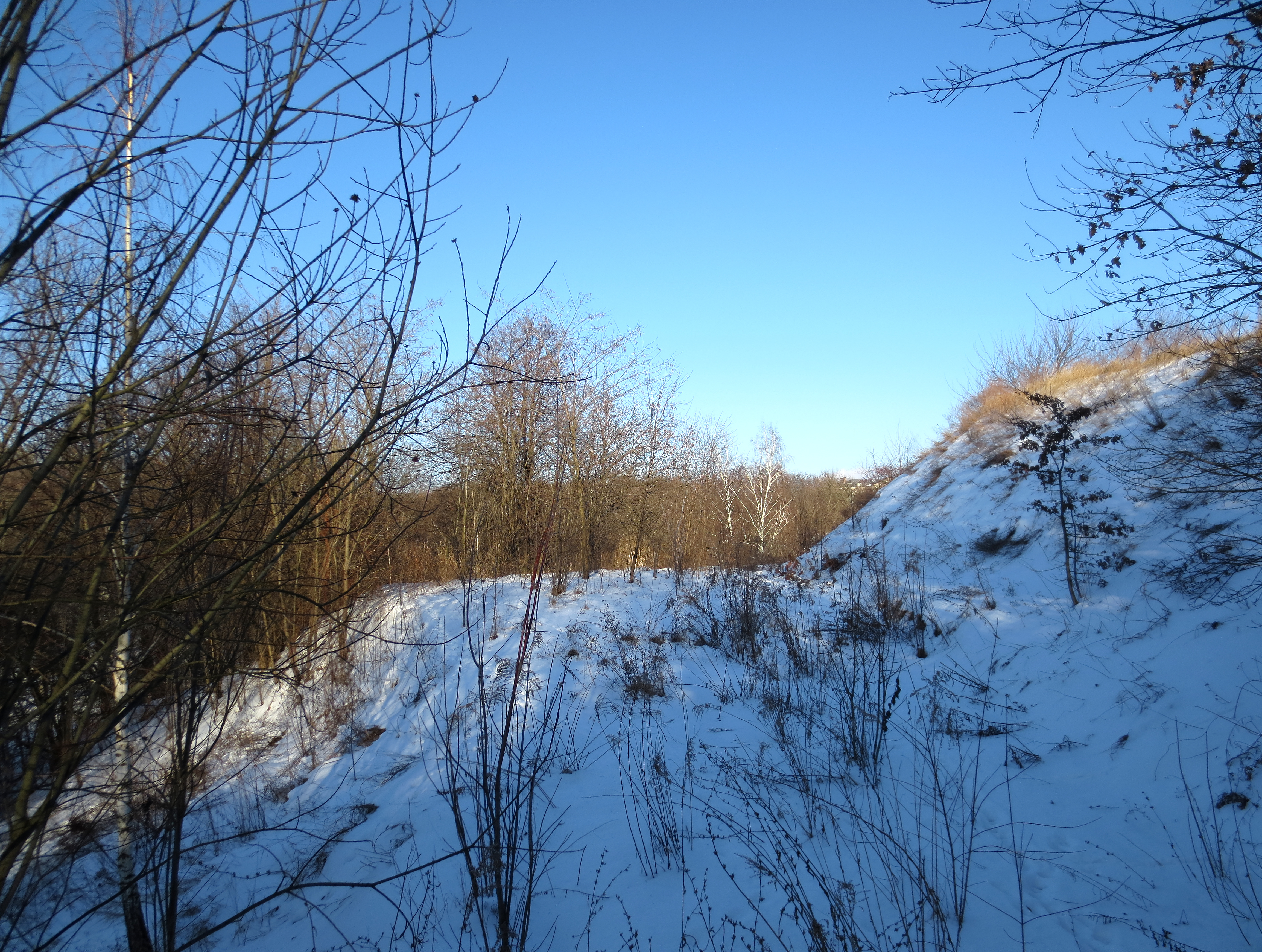 Хотівське городище, західний схил. Звідси добре видно профіль укріплень: угорі - ескарп (схил зі збільшеним похилом), під ним - тераса (берма), ще нижче - знову схил.